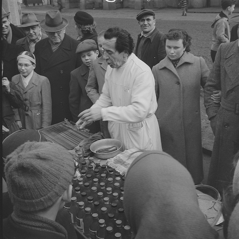 Original image description from the Deutsche Fotothek Vorführ- und Verkaufsstand für ein chemisches Reinigungsmittel